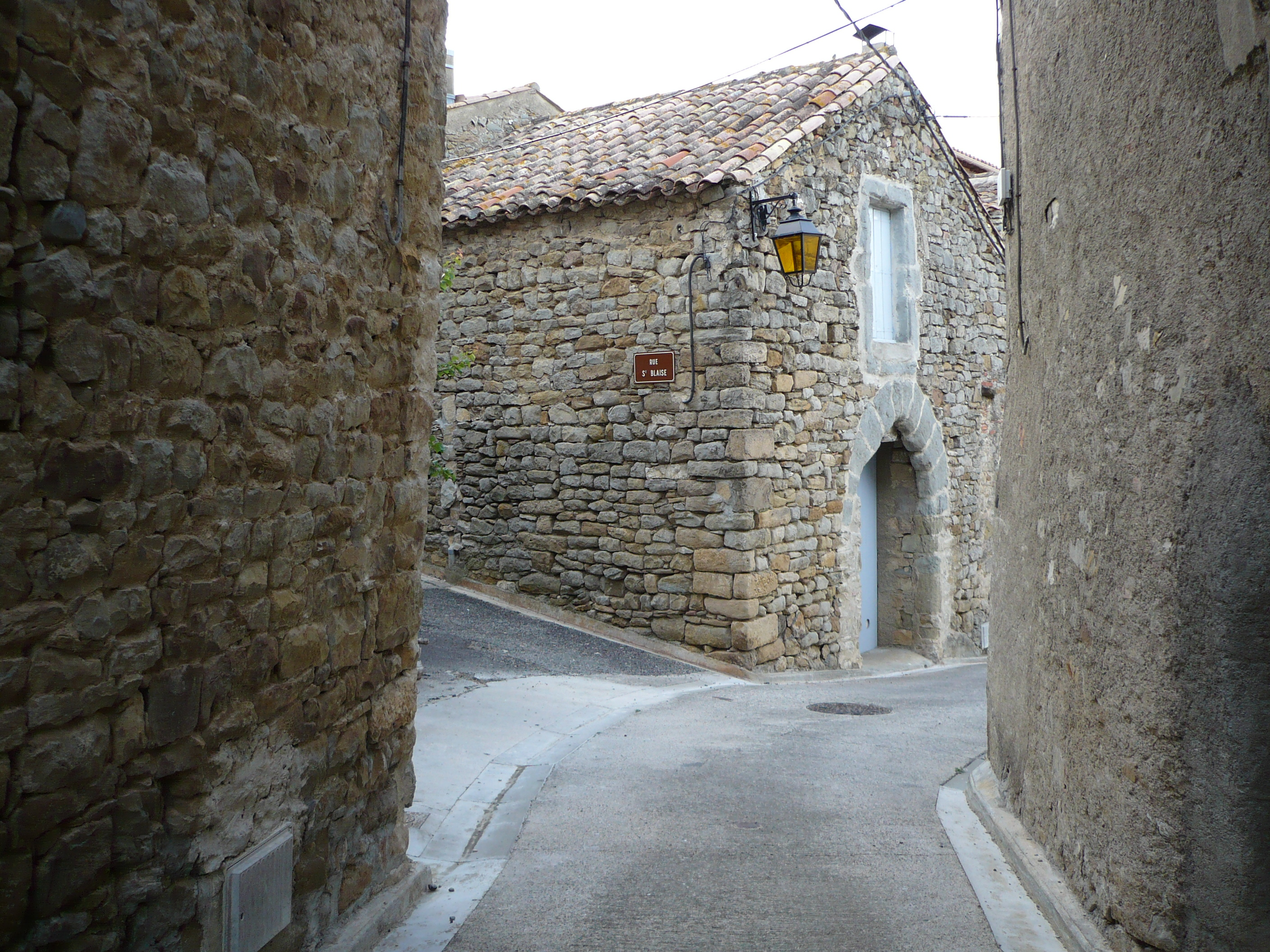 Iglesia antigua